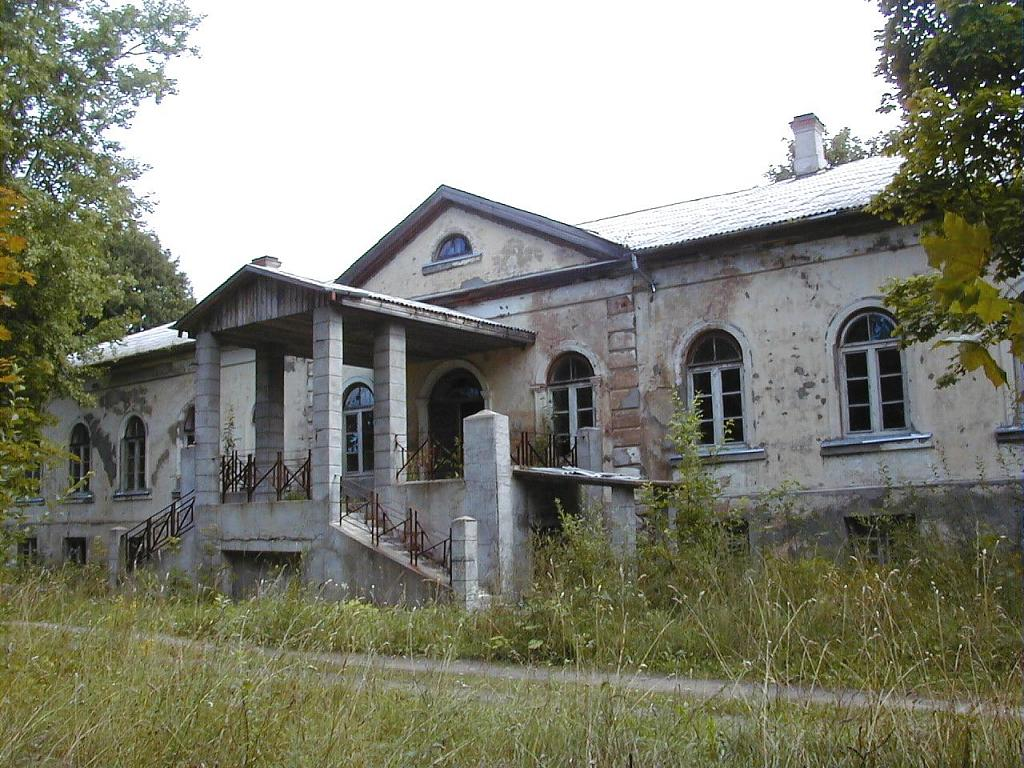 Zaļesjes muiža 2001-08-12